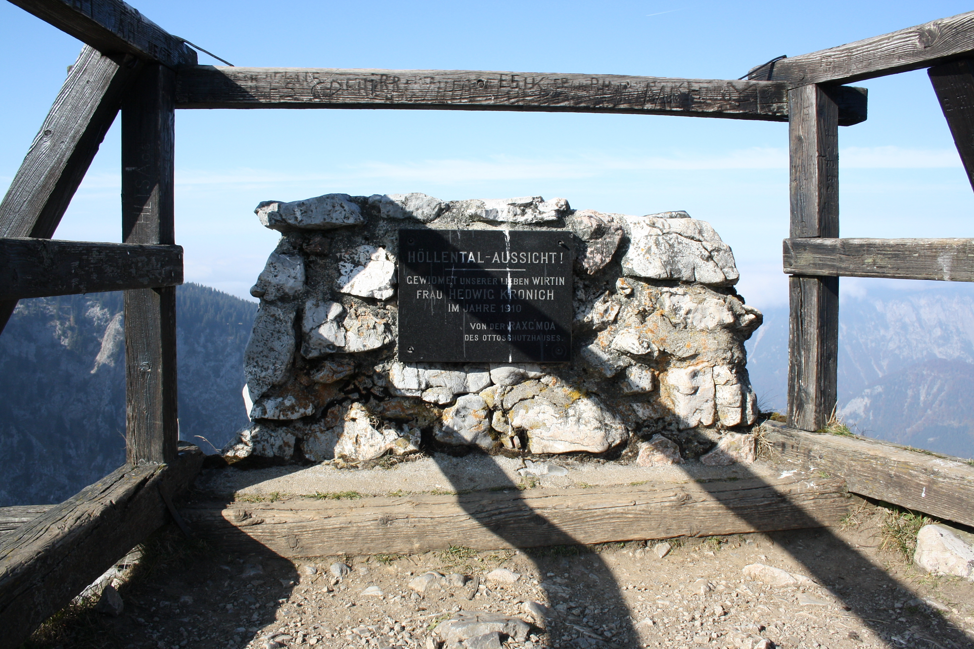 Denkmal bei der Höllentalaussicht, oberhalb des Großen Höllental-Talschlusses.